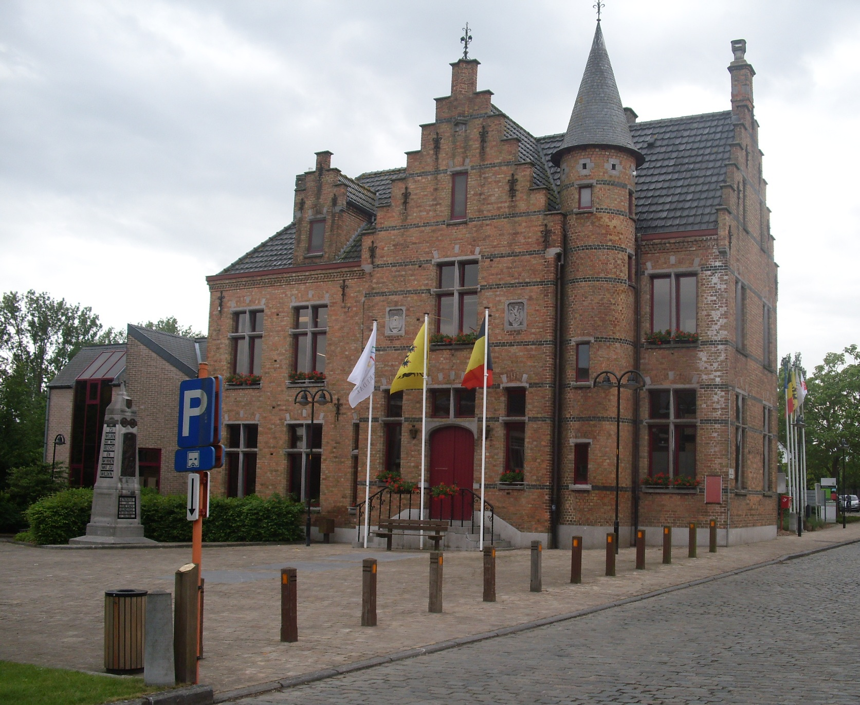 Gemeentehuis van Maarkedal - Etikhoveplein - Etikhove - Maarkedal - Oost-Vlaanderen - België